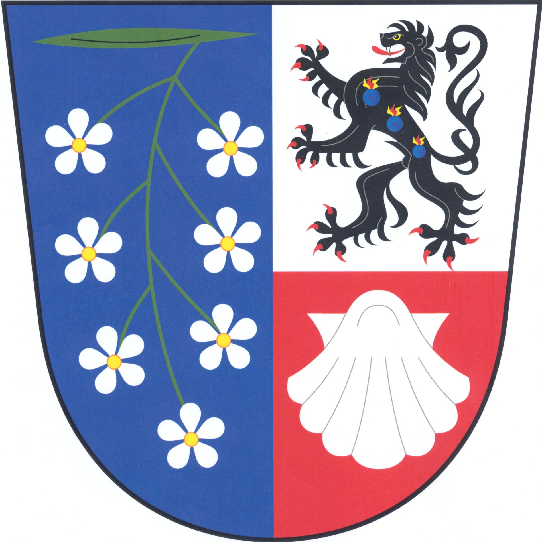 znak obce Bílá Třemešná